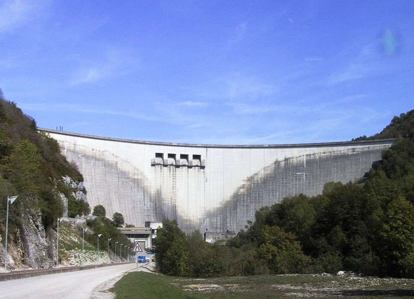 Talspär Vouglans Summer 2003.